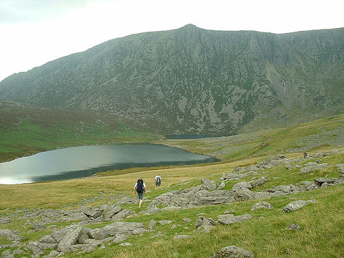 Craig Cwm Silyn, seen from the cwm silyn.